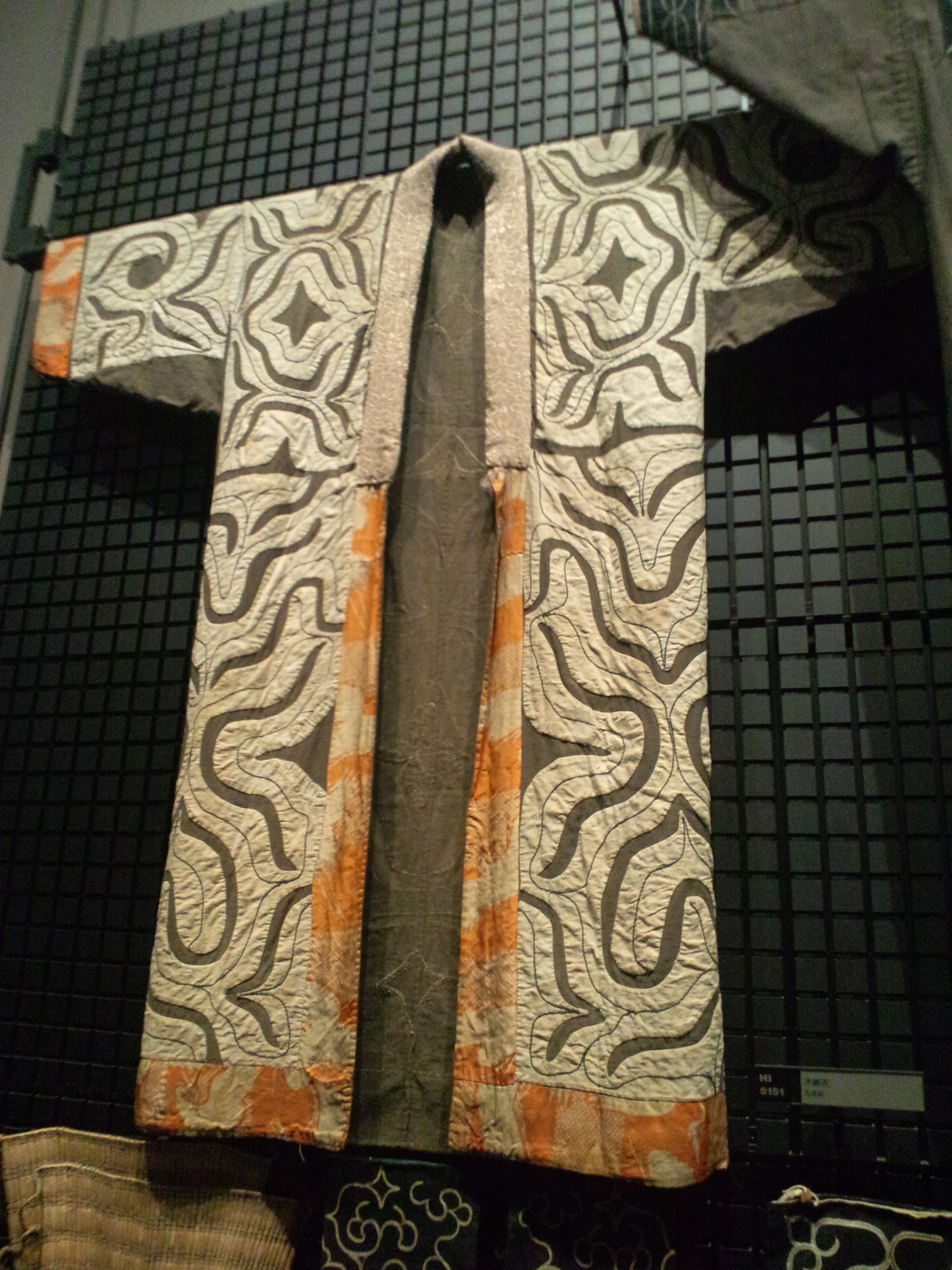 国立民族学博物館（大阪） 木綿衣